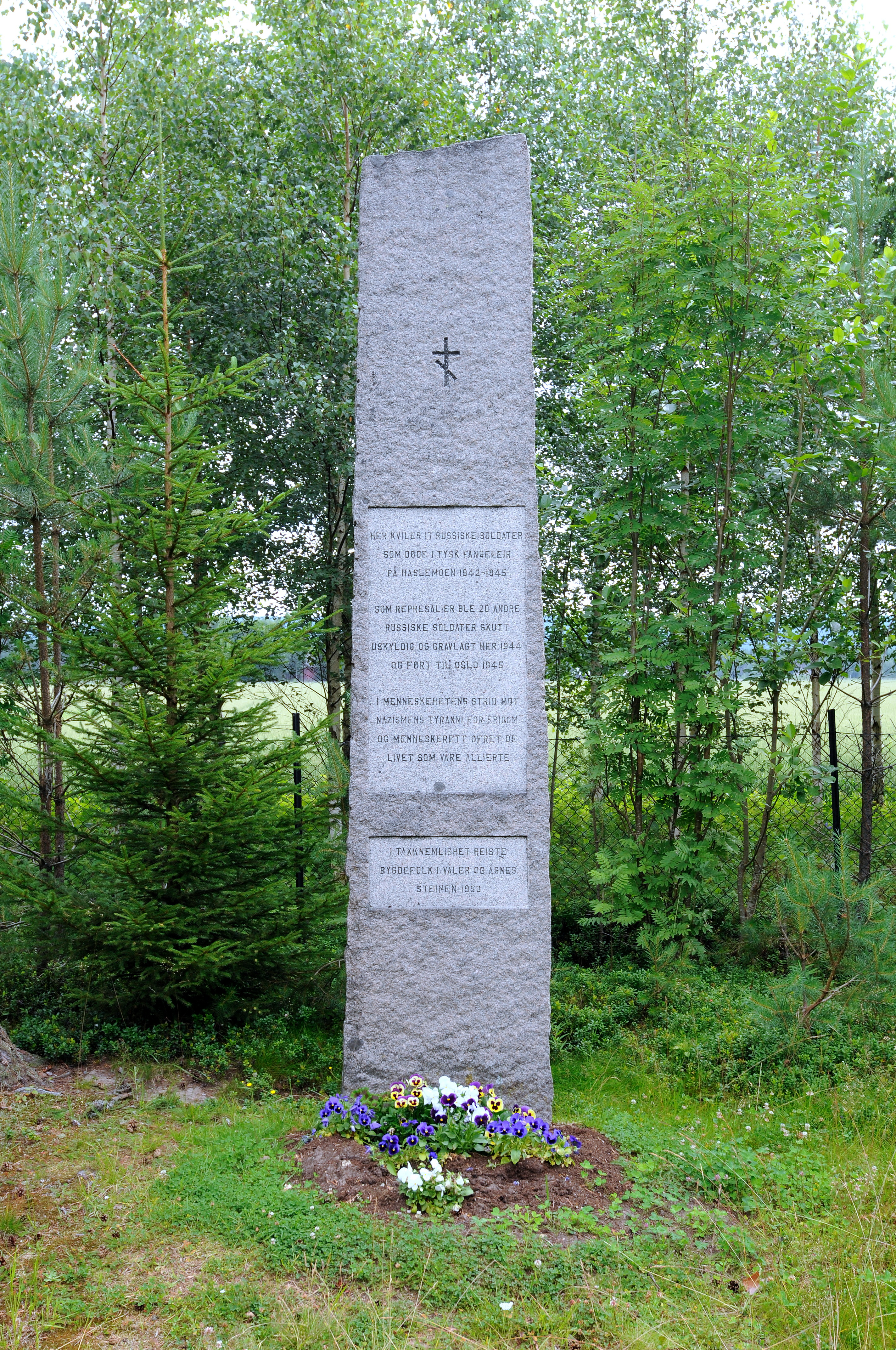 Krigsminnesmerke ved Haslemoen i Våler